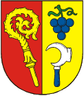 znak města